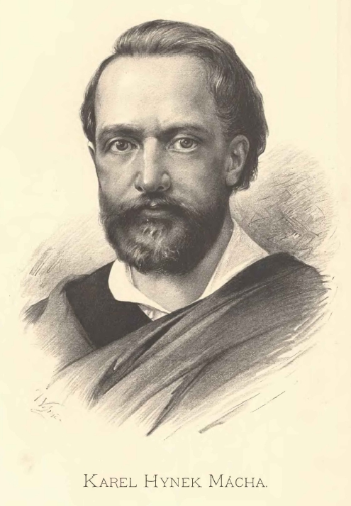 Portréty předních osobností od Jana Vilímka